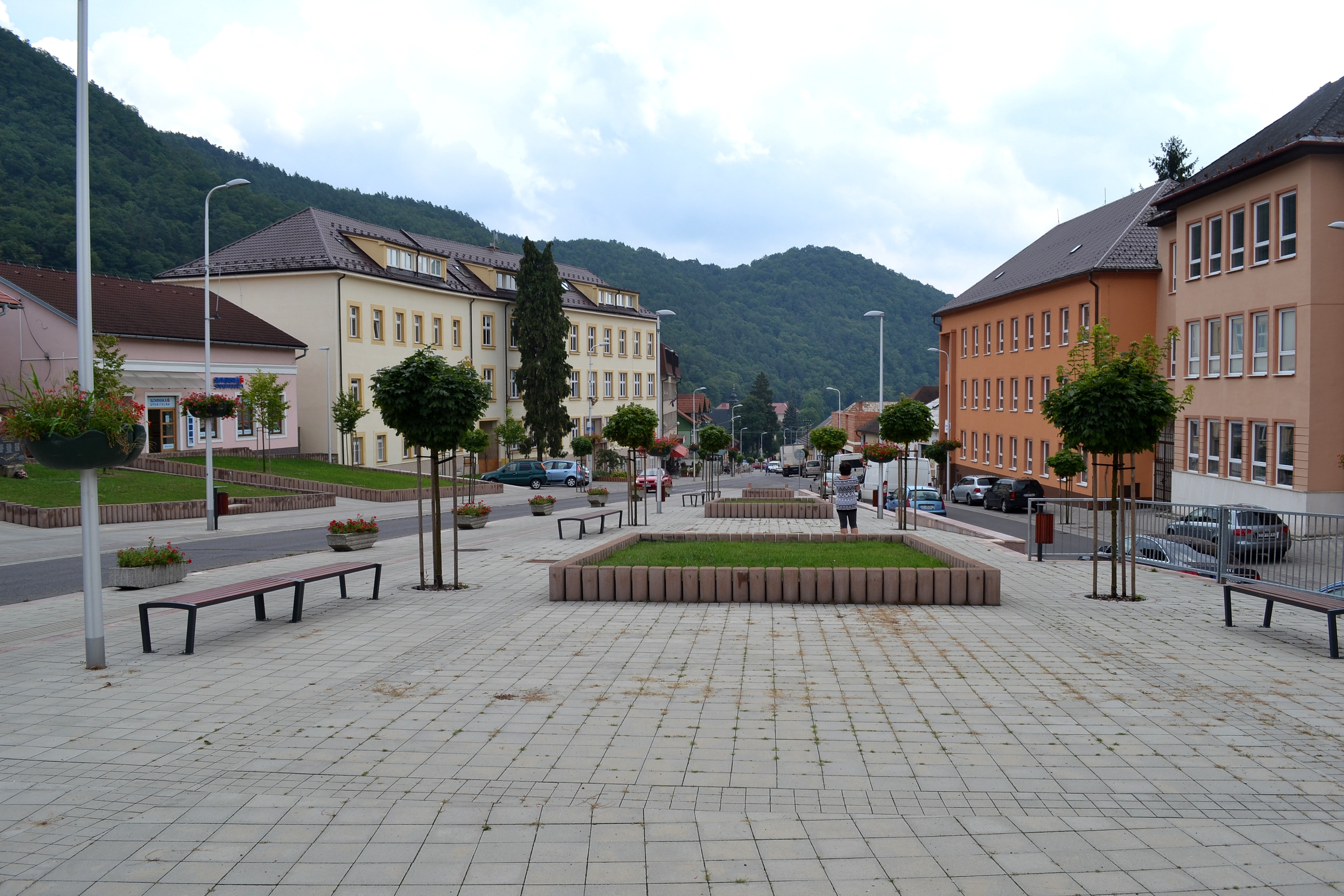 Pohľad na centrum Novej Bane